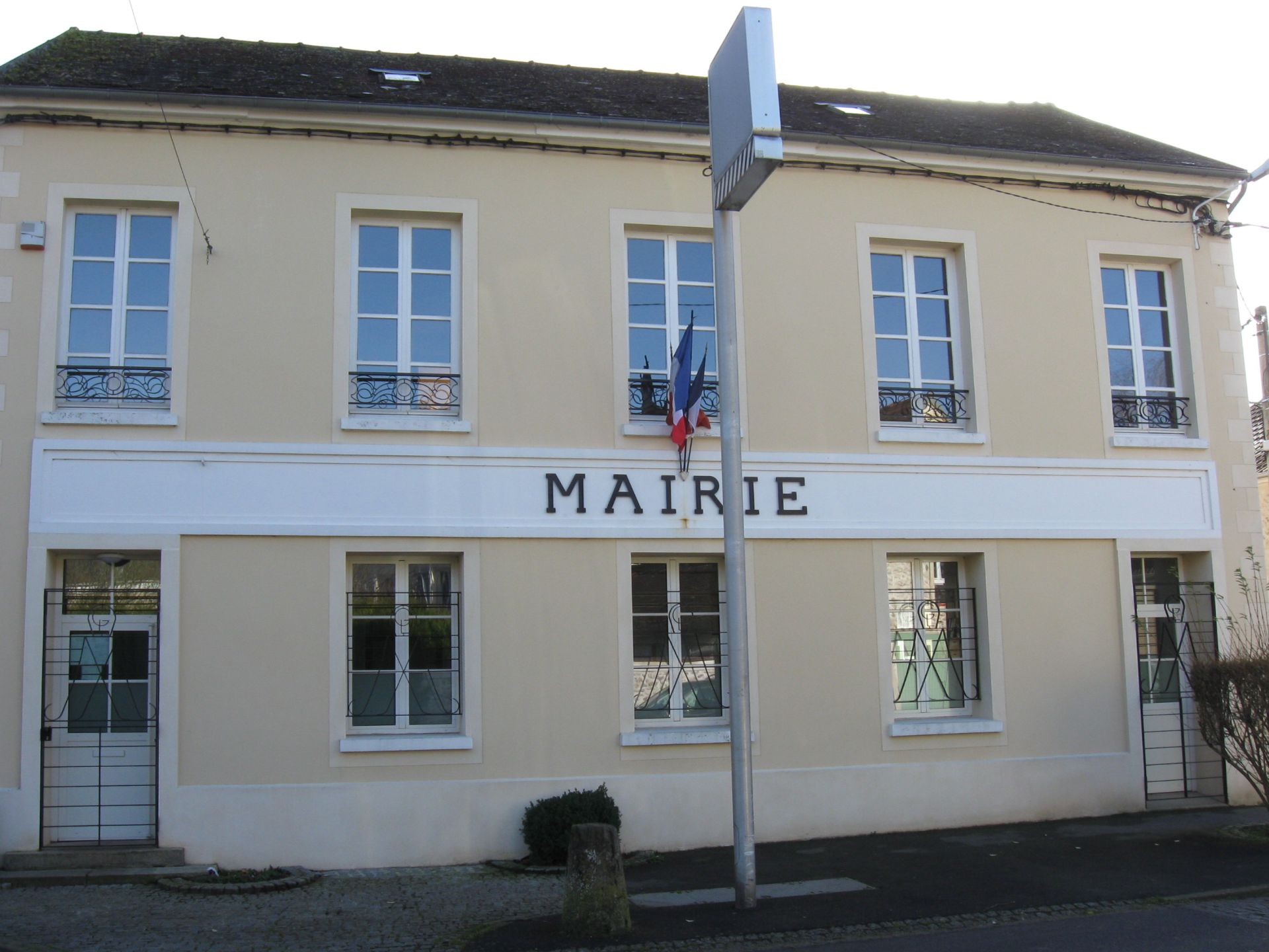 Mairie de Germigny-l'Évêque. (Seine et Marne, région Île-de-France).